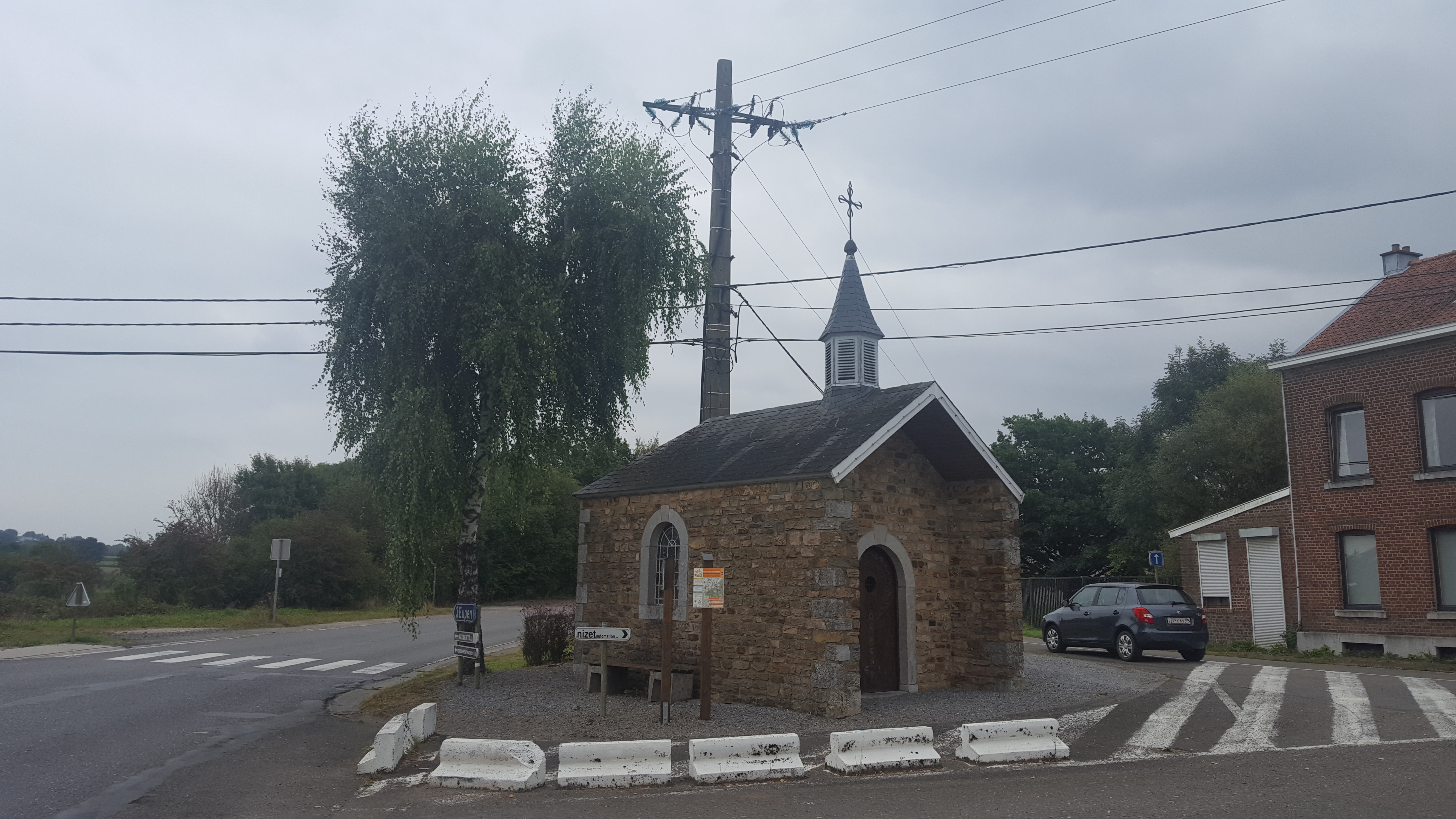 Chapelle St Quirin, Membach, Baelen, Belgique